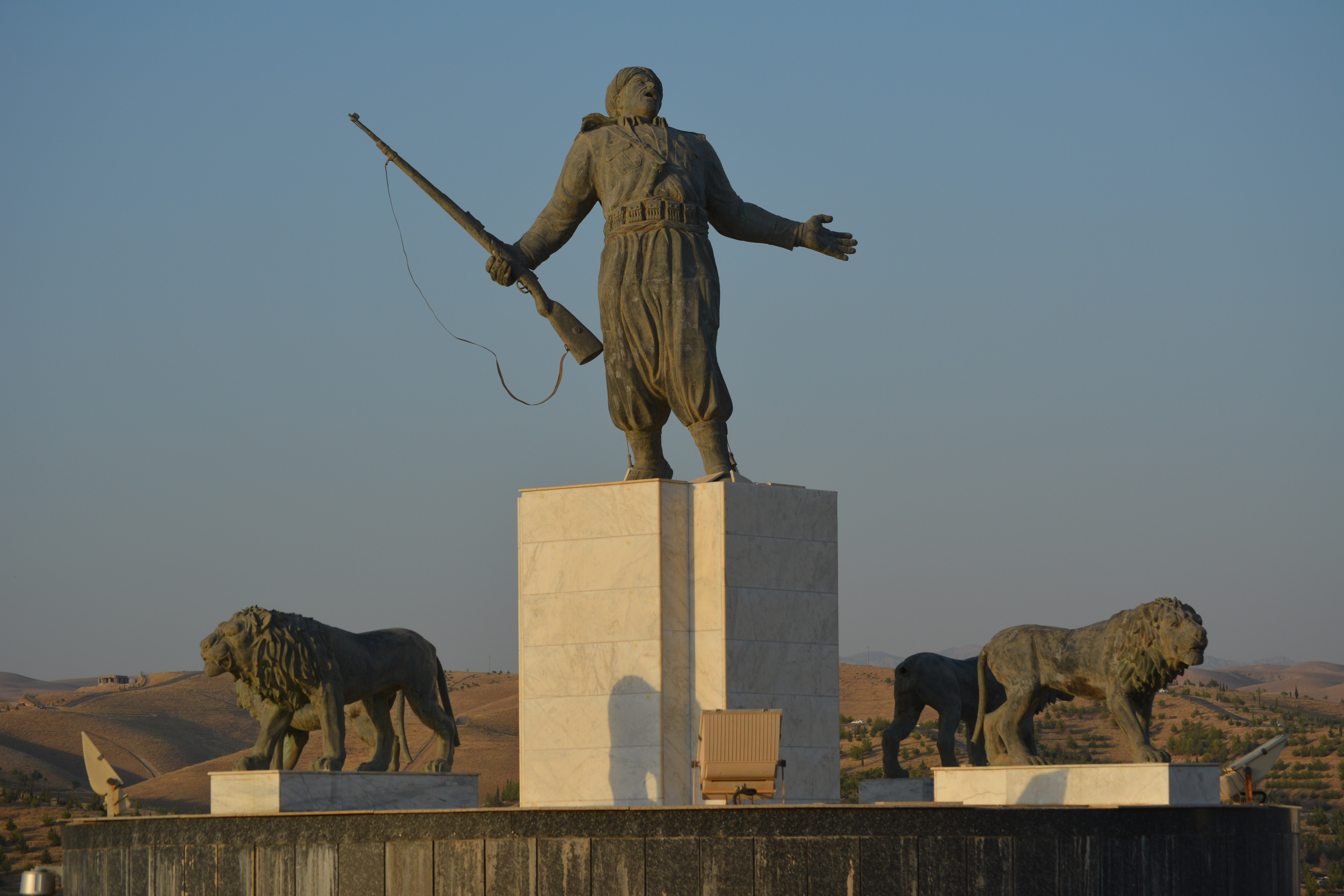 نحت الفنان والمعماري الكردي خسرو الجاف تحفة معمارية وفنية ترمز إلى شهداء الثورة الكردية ويقوم فوق أرض مساحتها 25 دونما بتكلفة تقترب من 19 مليون دولار وتم البدأ ببنائه في سنة 2010 وتم الانتهاء منه في سنة 2012.